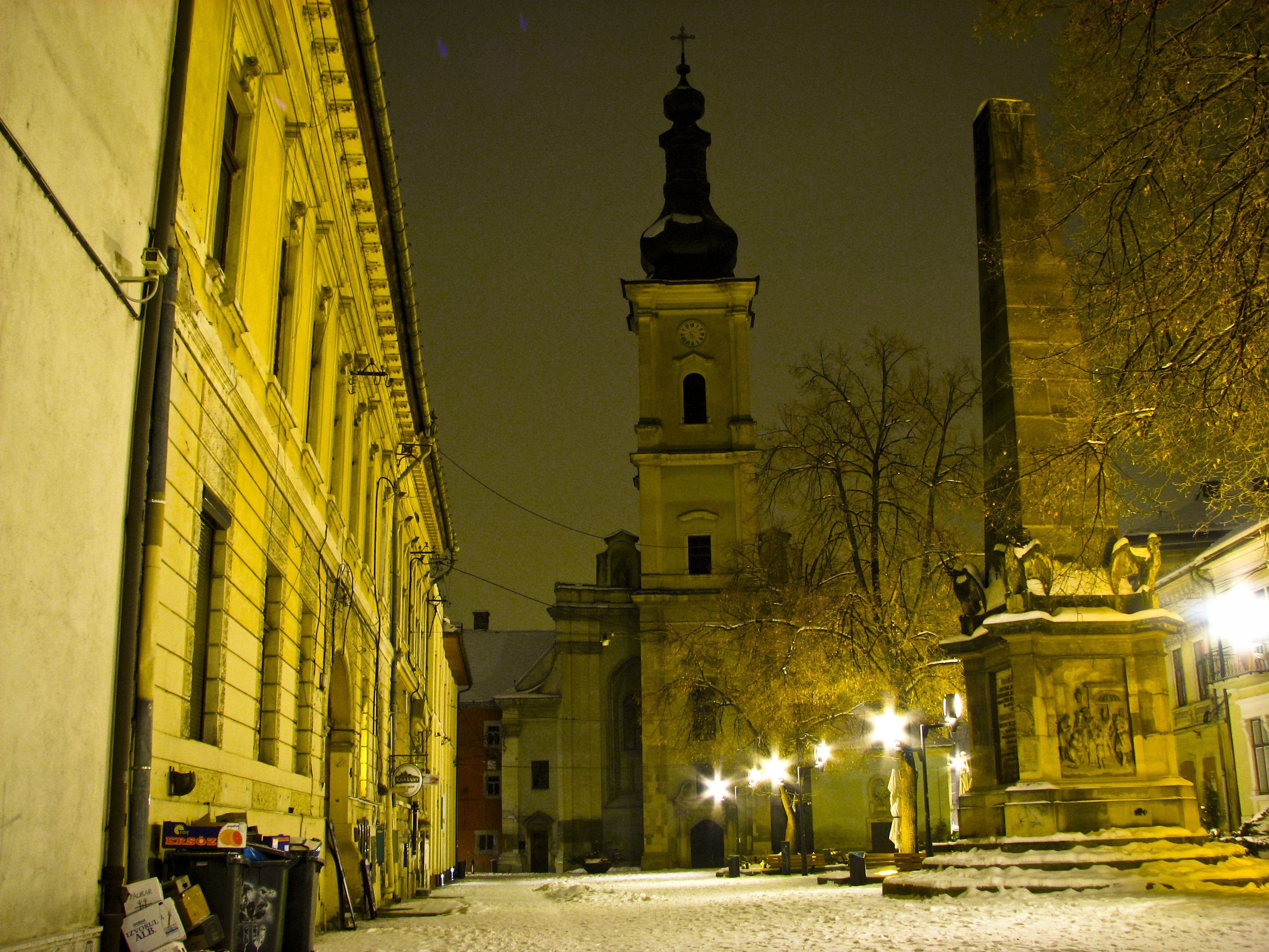 Edificii de epocă medievală - orașul antic și medieval din zona Piata Muzeului 05